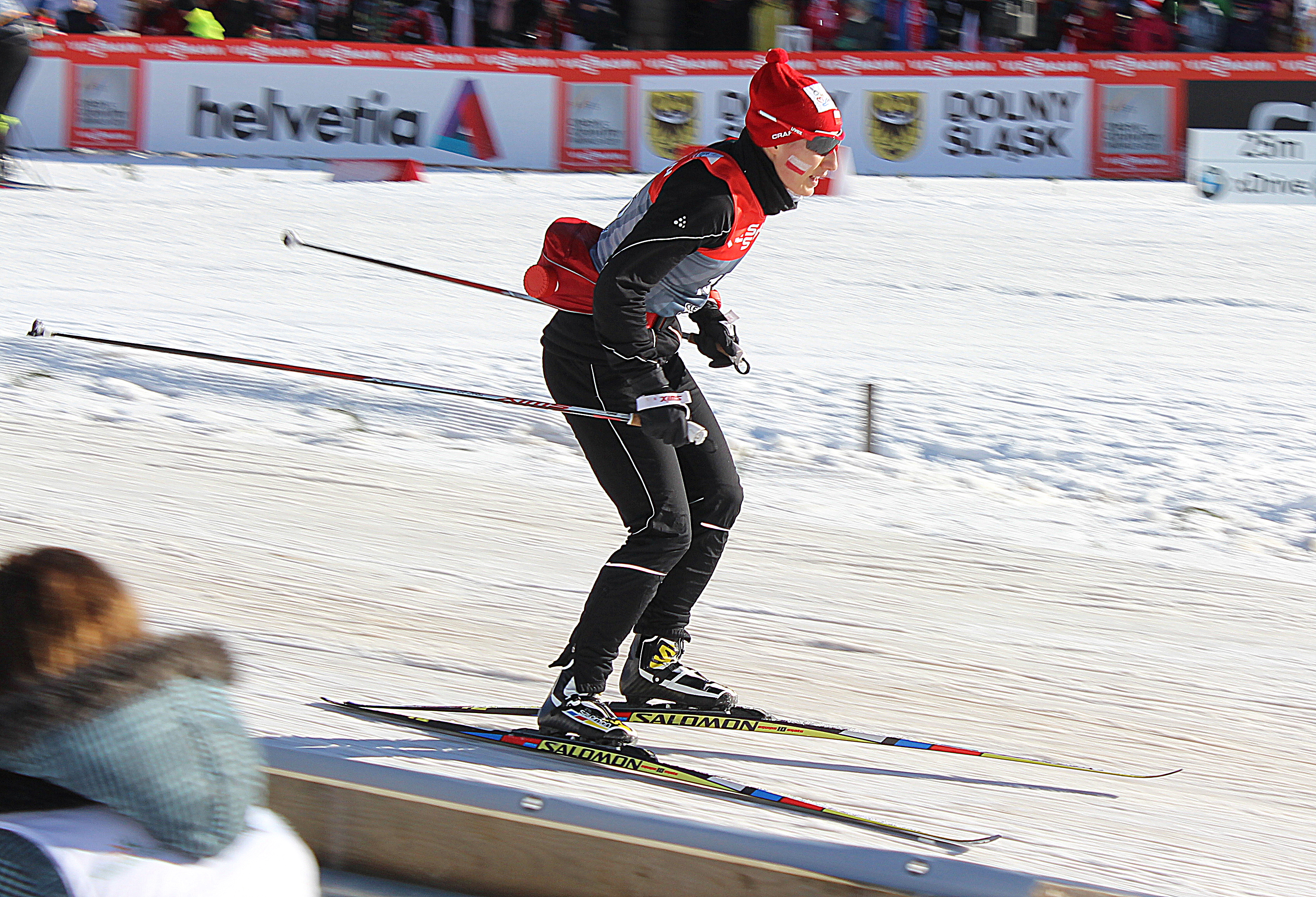 Sylwia Jaskowiec